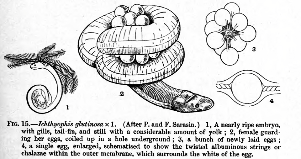 Caecilian